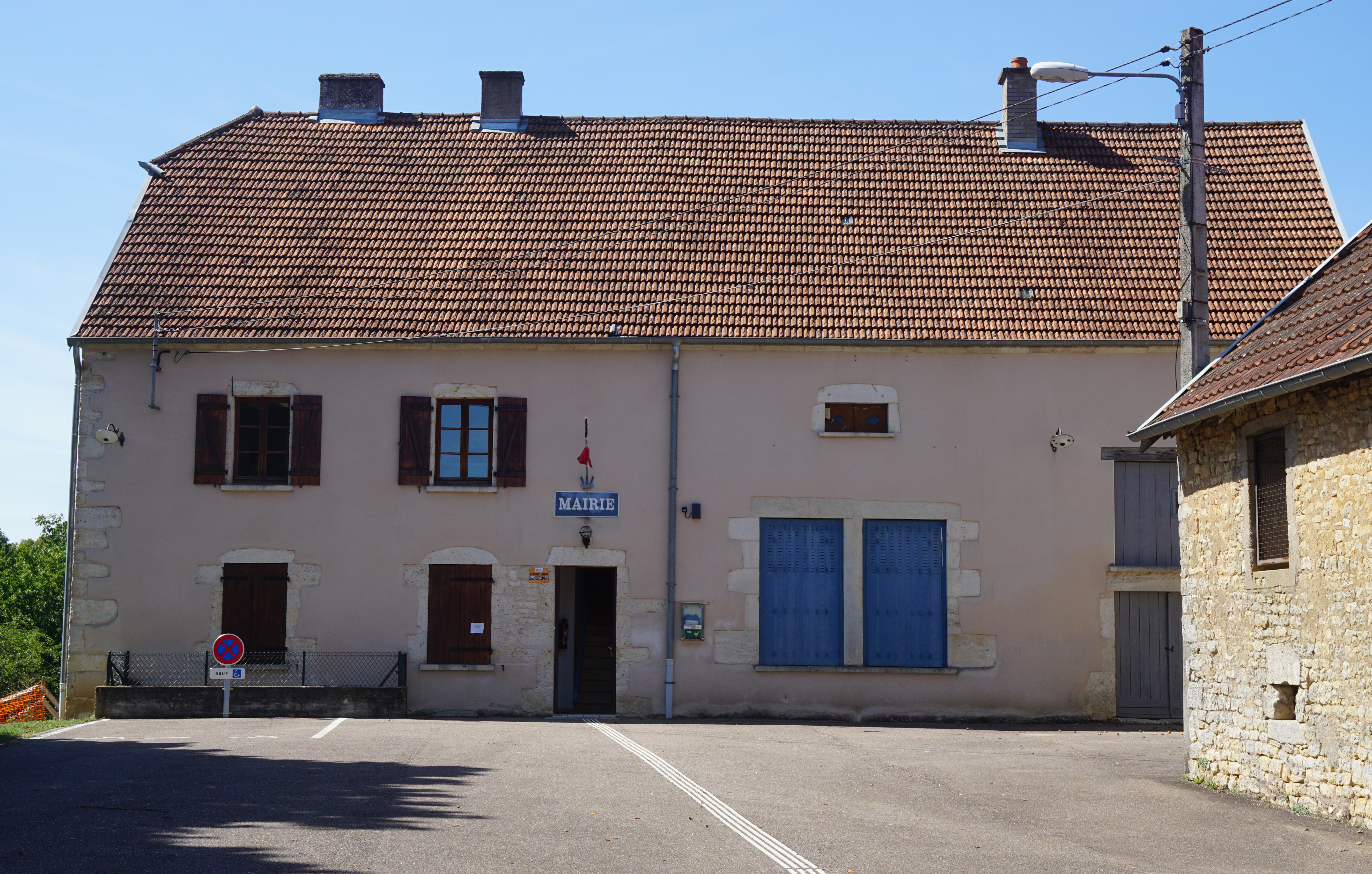 La mairie de Fédry.